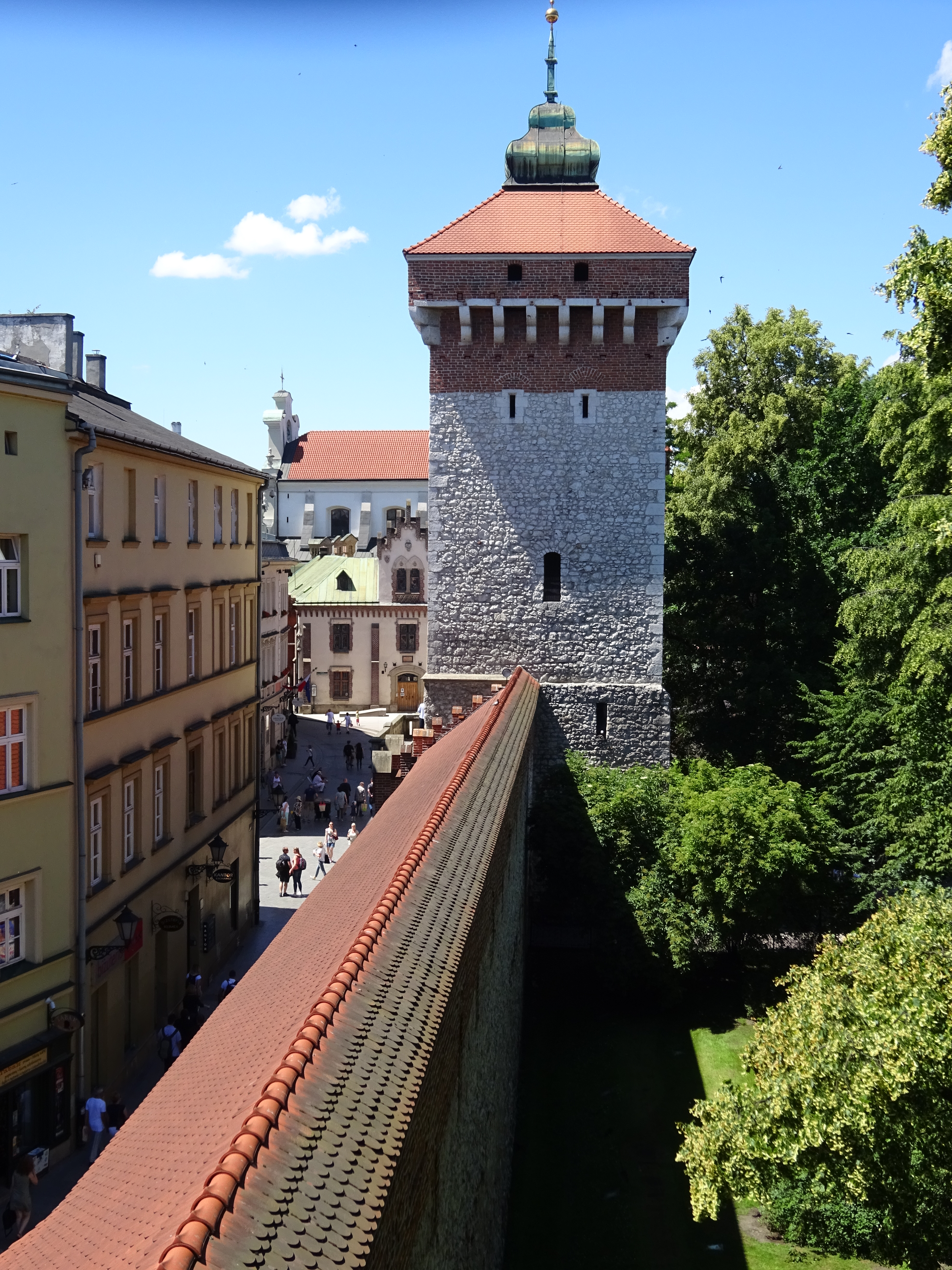 Brama Floriańska i Mur Obronny. Widok z Baszty Pasamoników. Kraków, 2016.